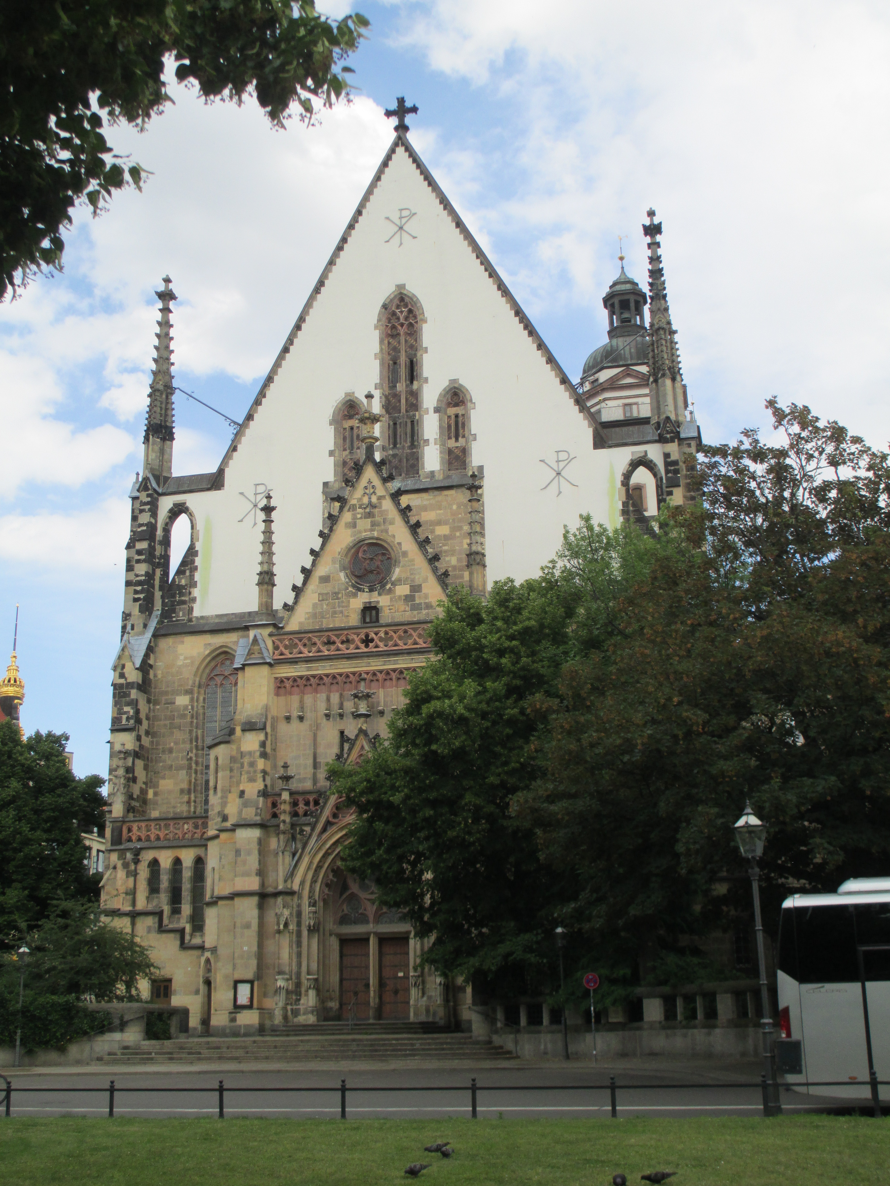 כנסיית תומס בלייפציג